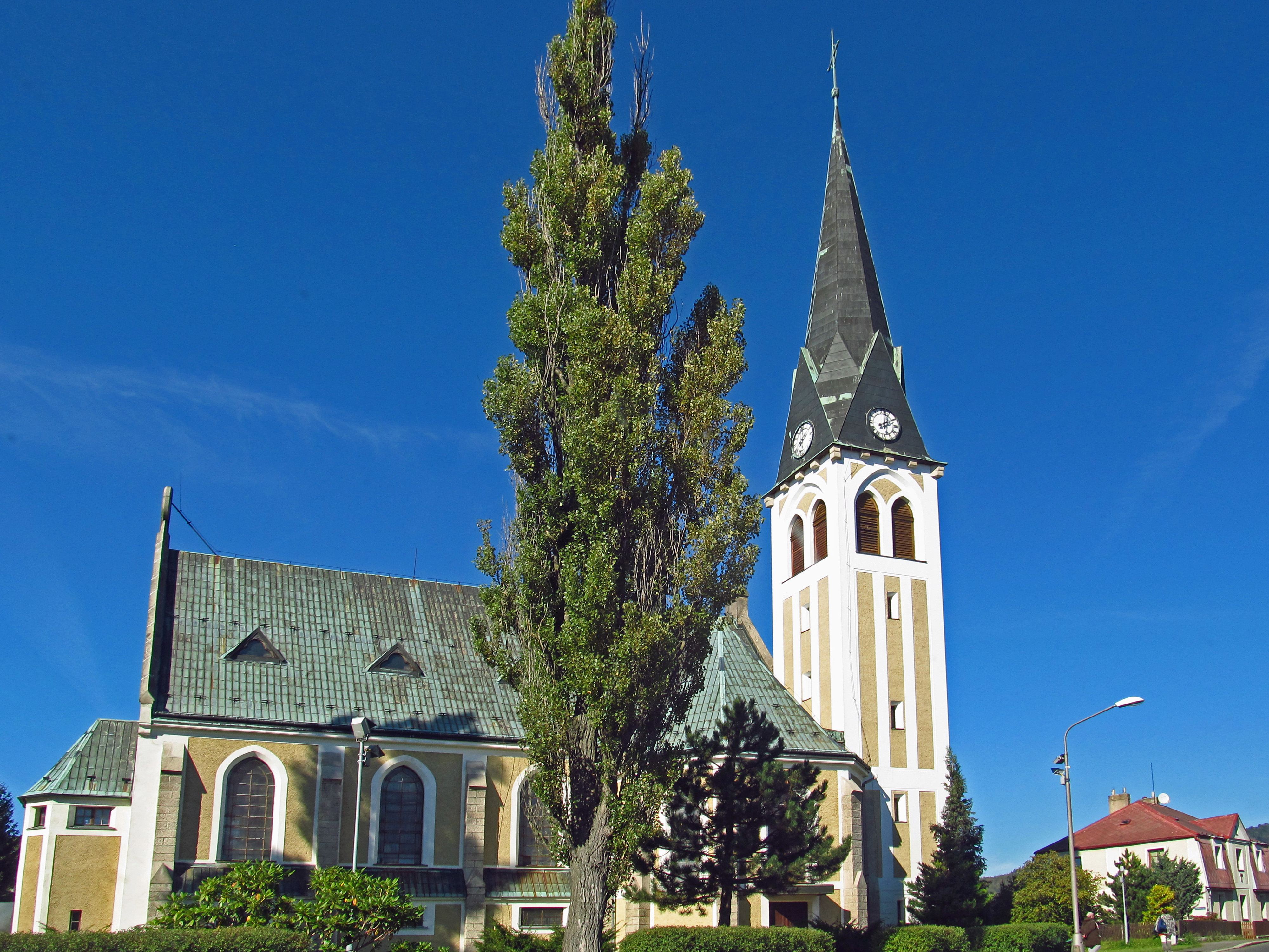 Kostel sv. Antonína Paduánského s farou (Liberec), Markova 299/4, Liberec